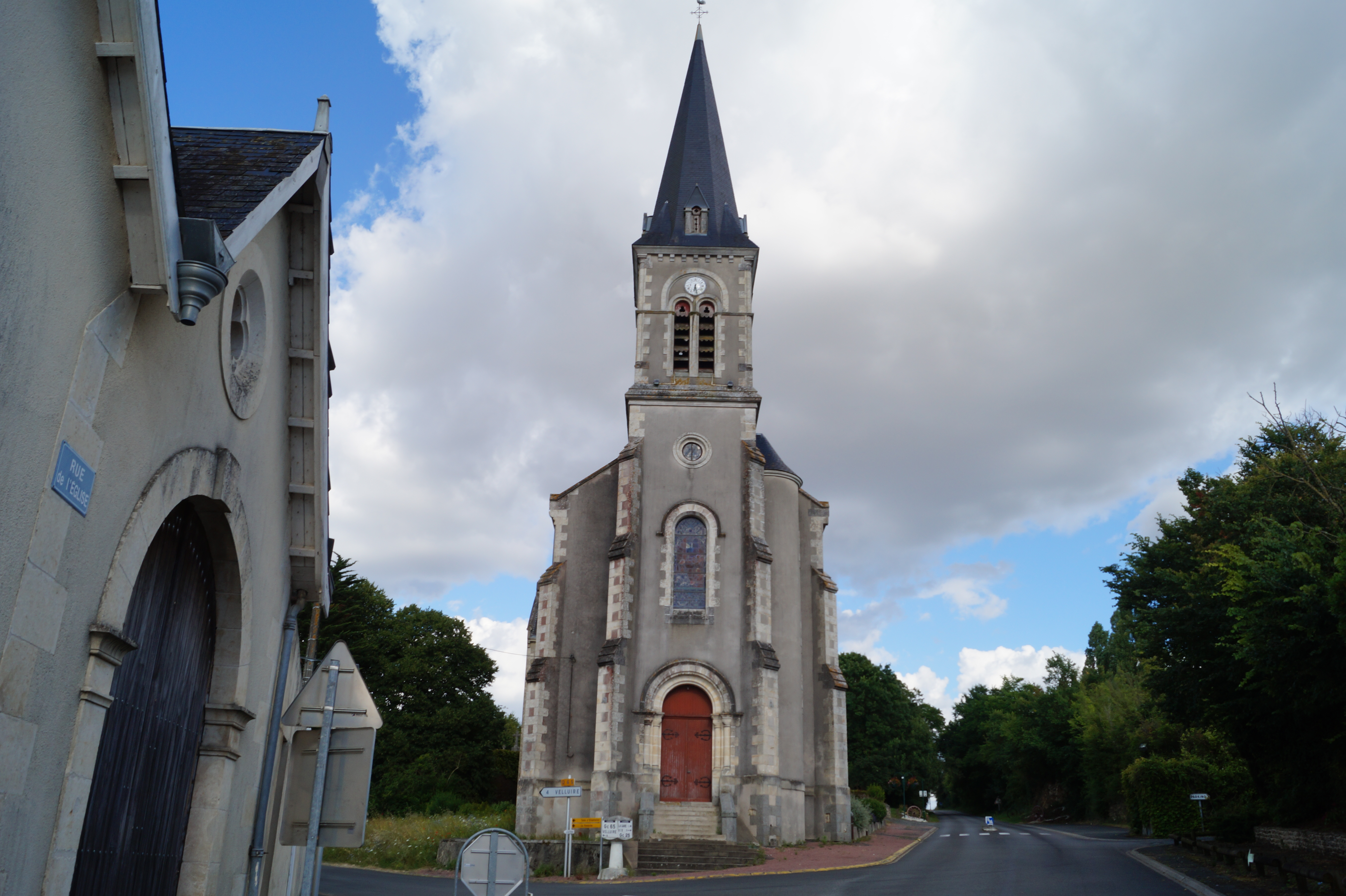 L’église Saint-Martin du Gué-de-Velluire depuis la rue de l’Église.